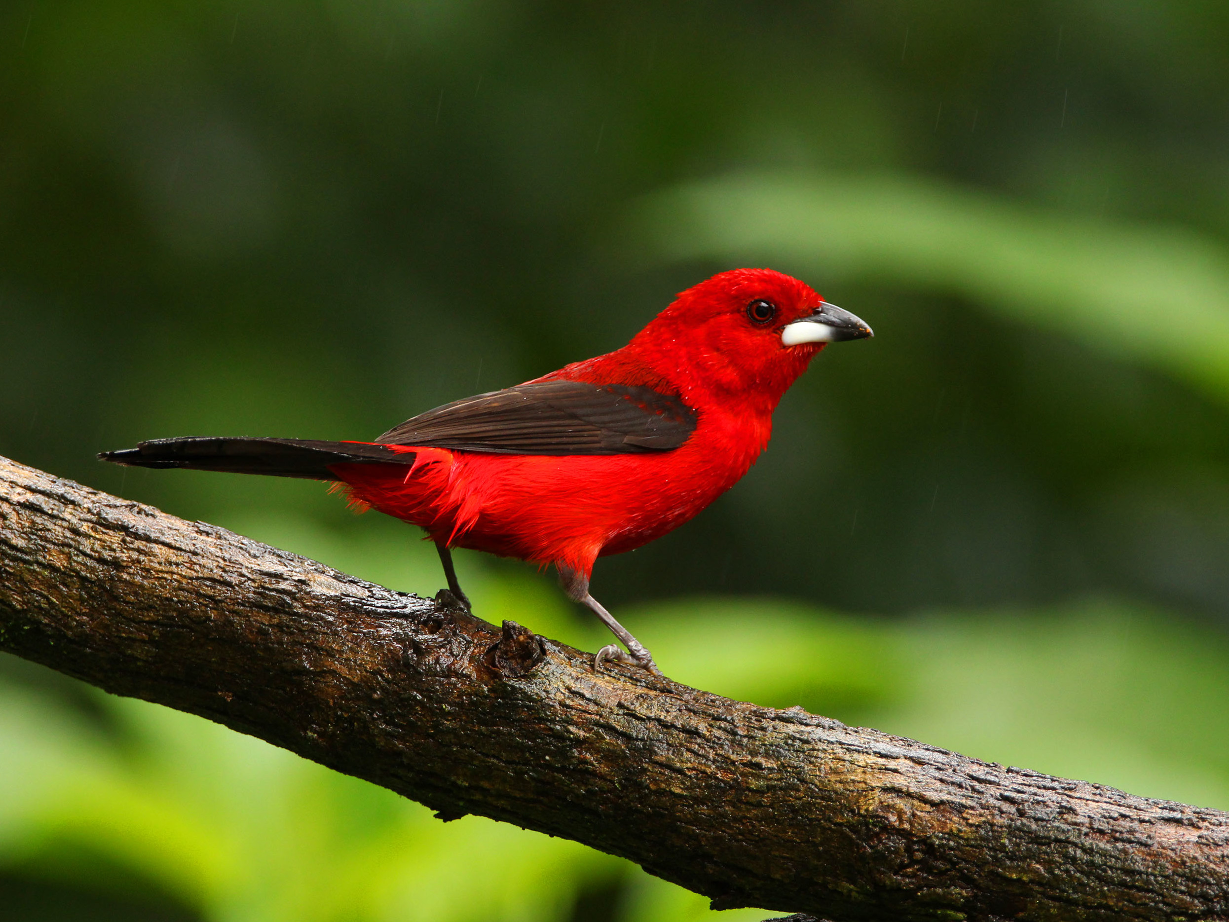 Tiê-Sangue (Ramphocelus bresilius), uma das mais belas e chamativas aves da Mata Atlântica brasileira.